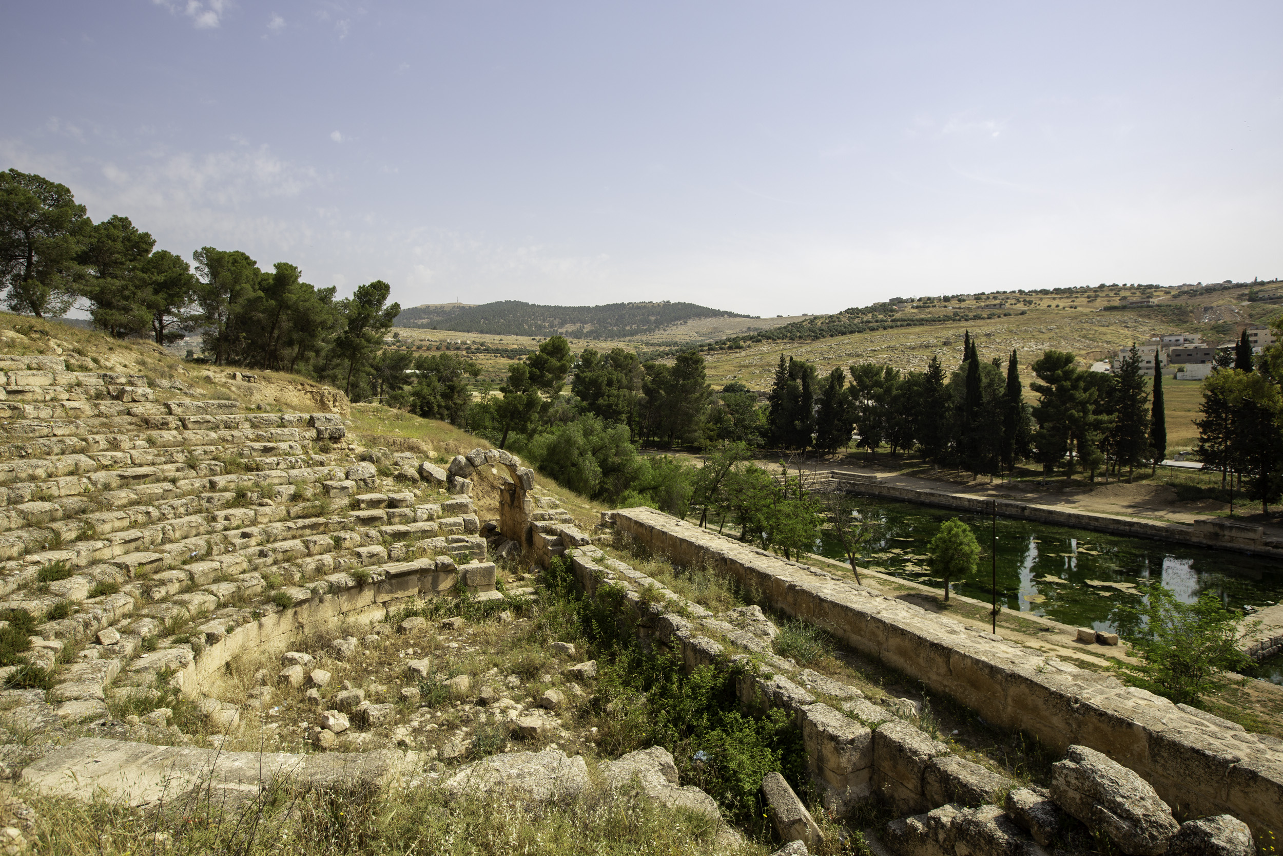 Jerash (Birketein)